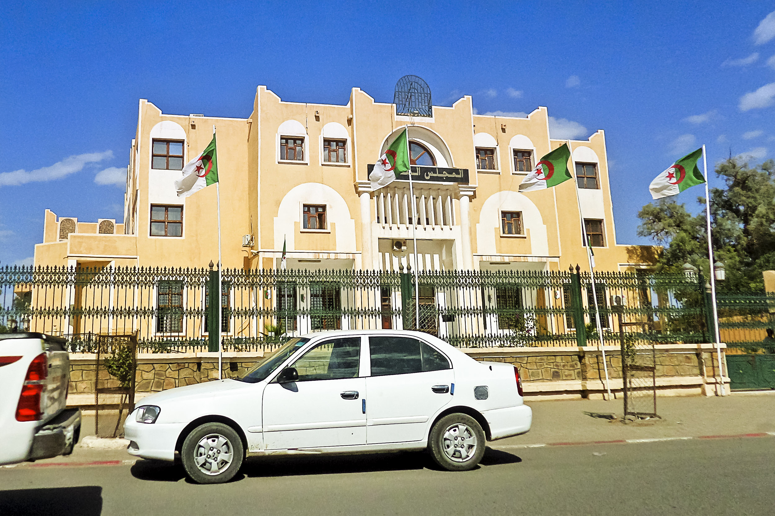 Cour d'assises de Tamanrasset مجلس قضاء تمنراست